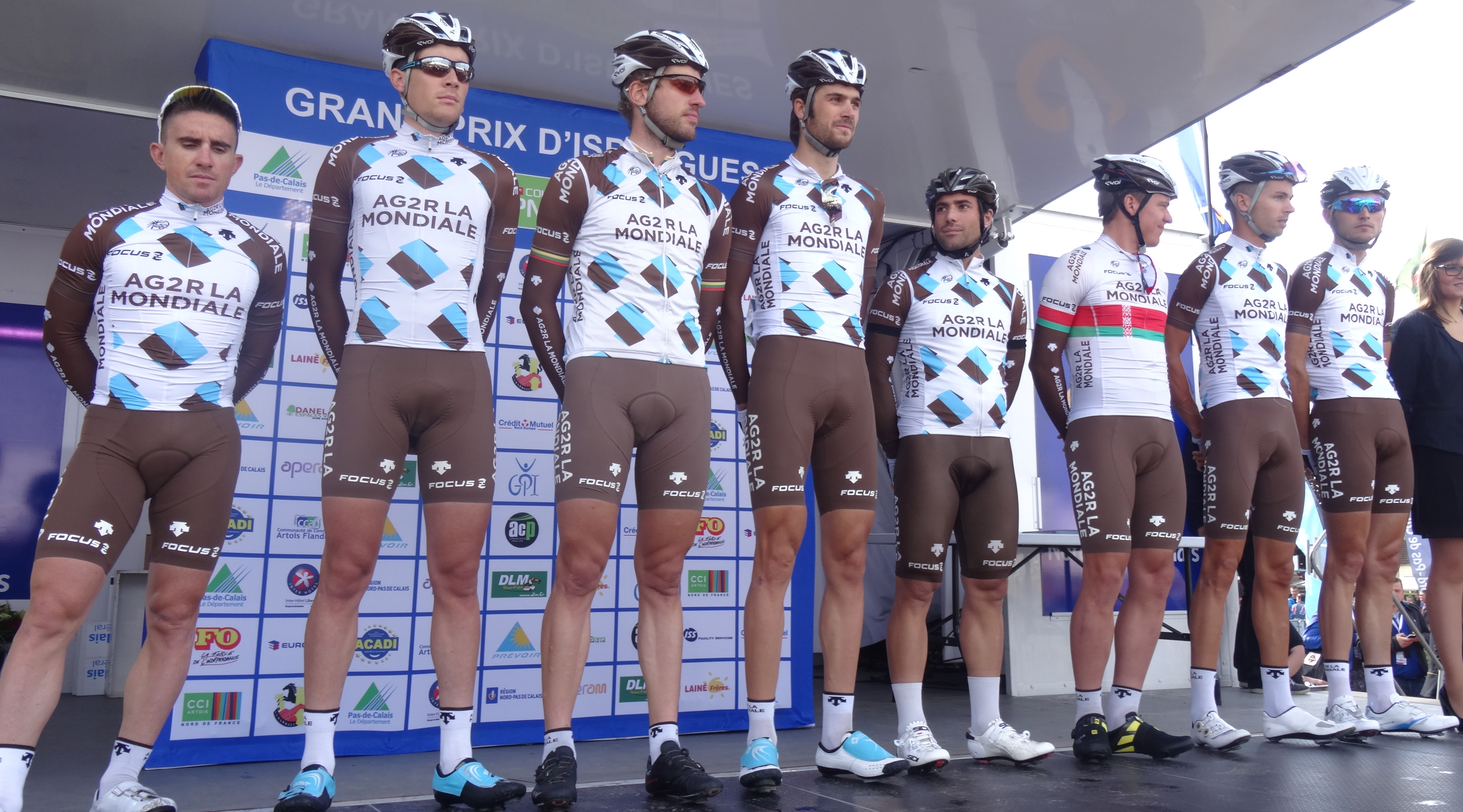 Reportage réalisé le dimanche 21 septembre à l'occasion du départ et de l'arrivée du Grand Prix d'Isbergues 2014 à Isbergues, Nord-Pas-de-Calais, France.